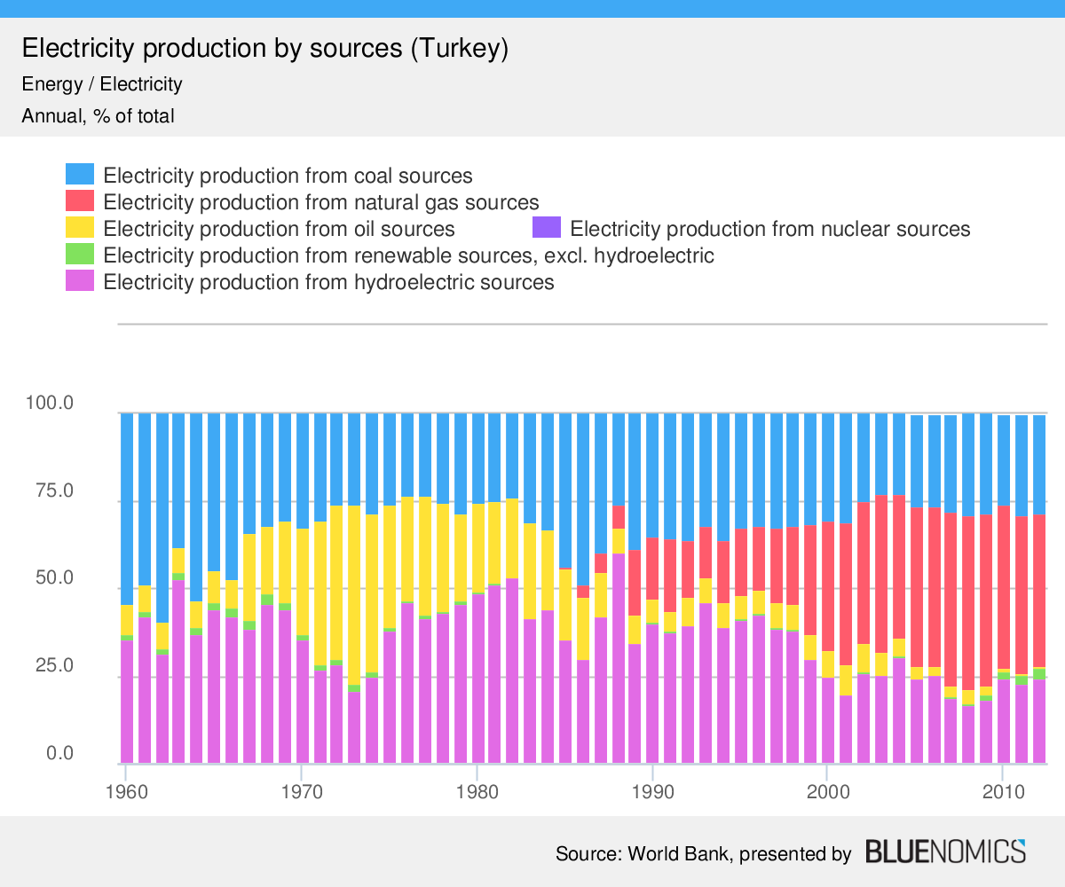 Diese Graphik zeigt die Struktur der Stromproduktion in der Türkei